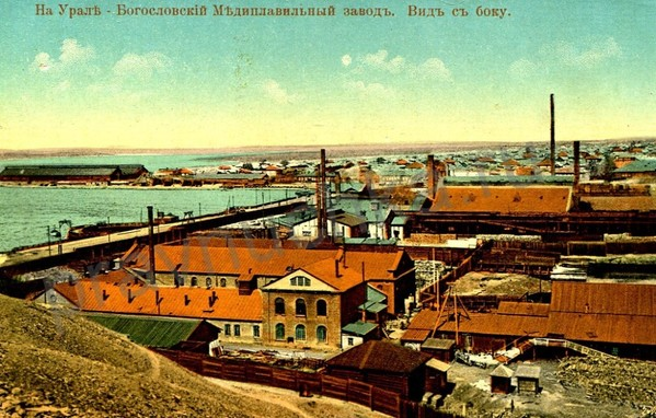 Богословский медеплавильный завод вид сбоку